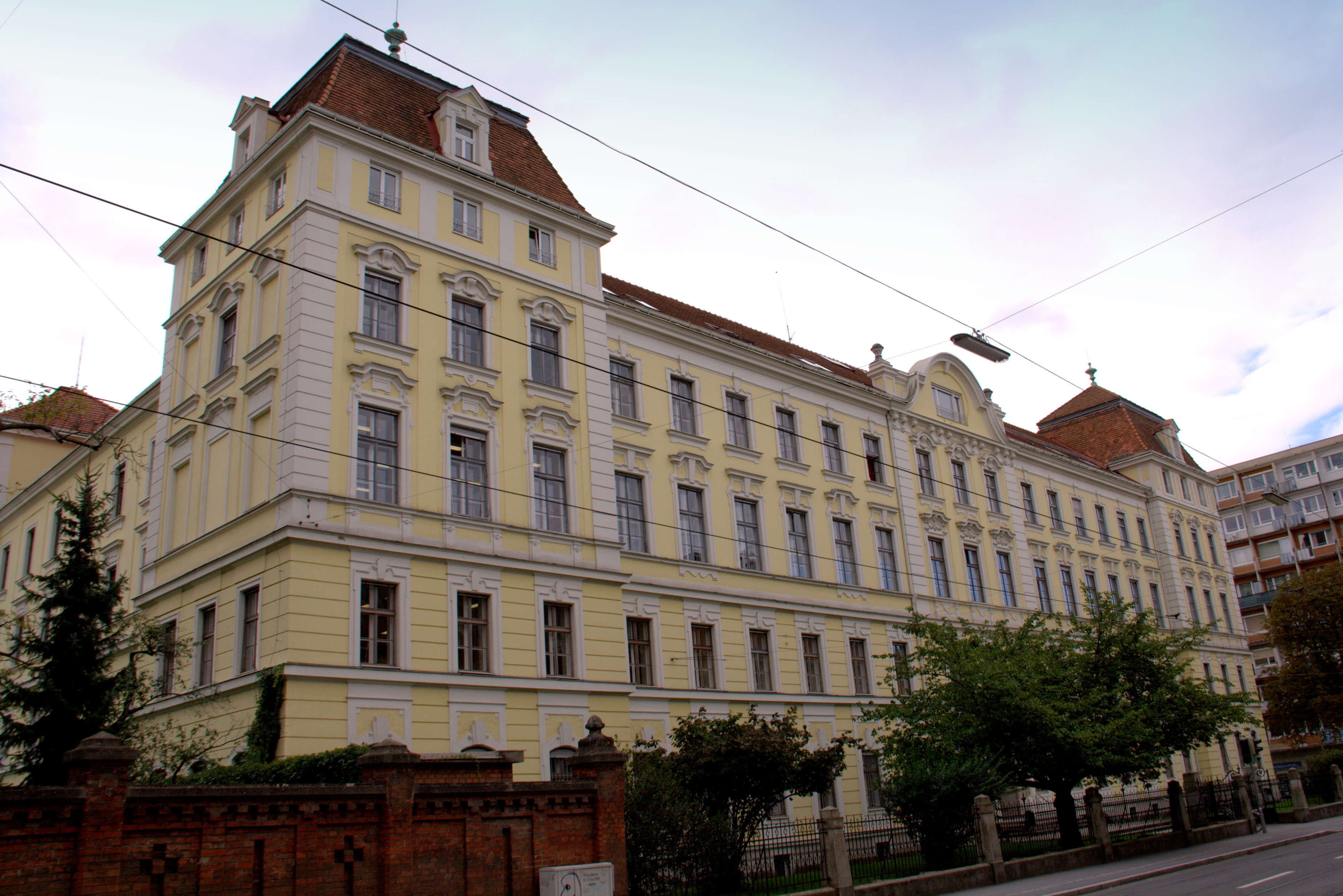 Ursulinenkloster, Schule, Ursulinenkonvent. Graz.